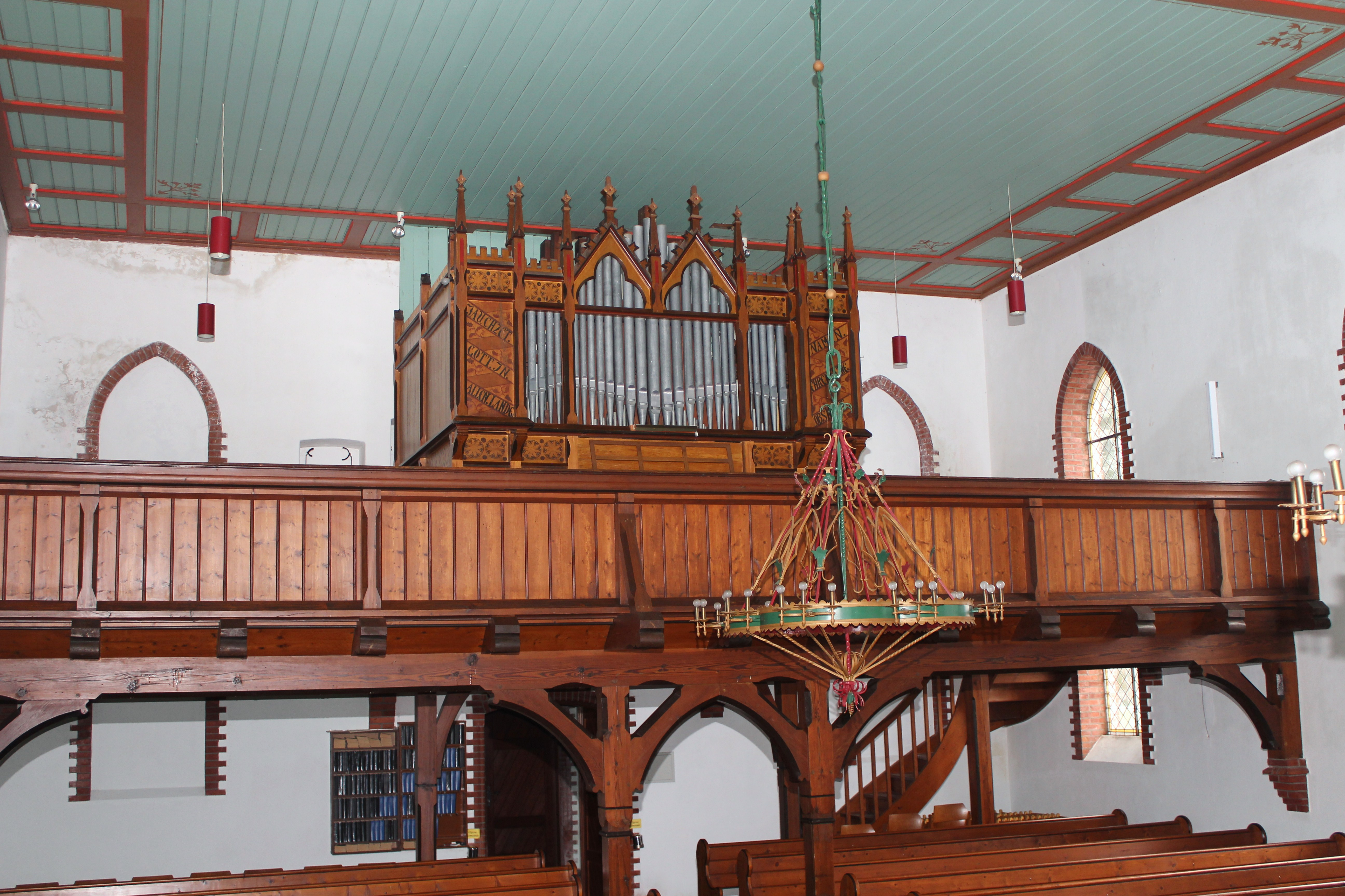 Furtwängler&Hammer - Orgel (1895) in Ostgroßefehn